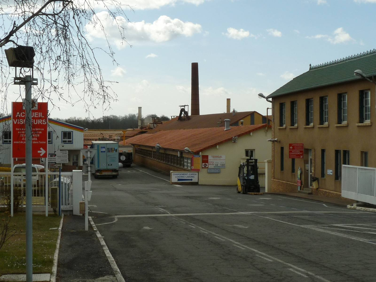 tuilerie Terreal, Roumazières-Loubert, Charente, France